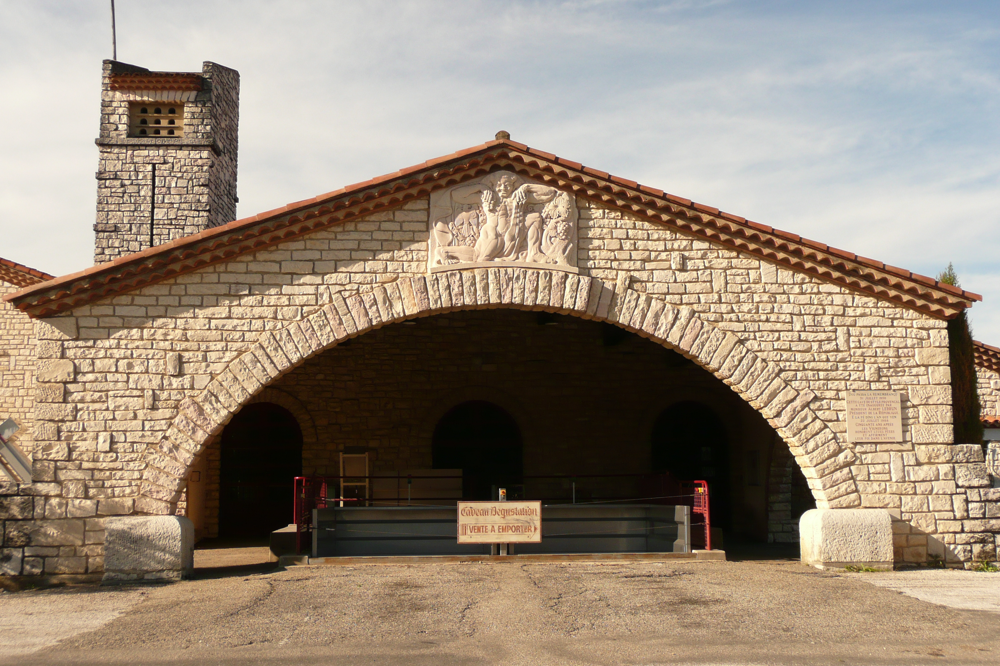 Cave coopérative de Tavel.